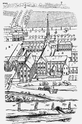 Abbaye Citeaux, Skizze